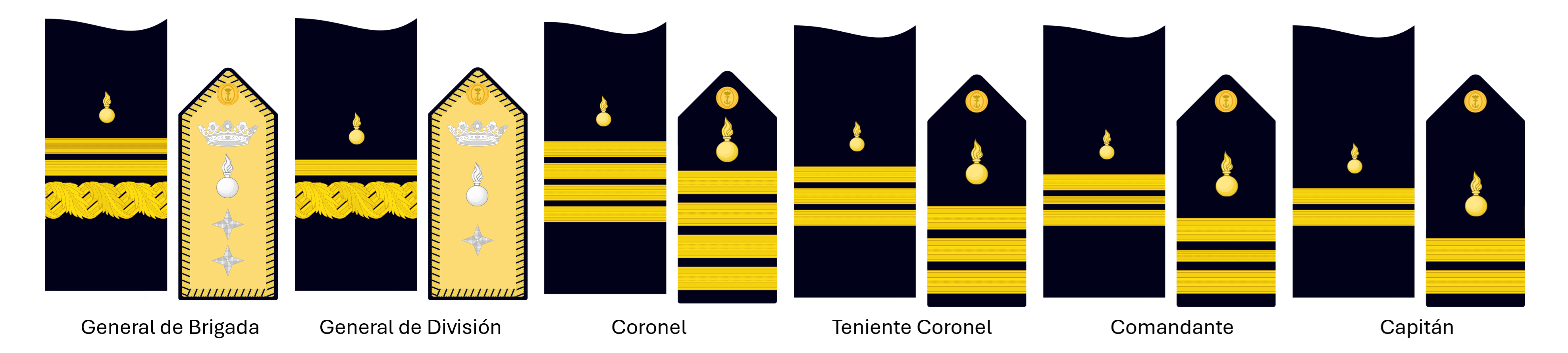 Bocamangas del Cuerpo Facultativo de Armas Navales (activo hasta 1967)